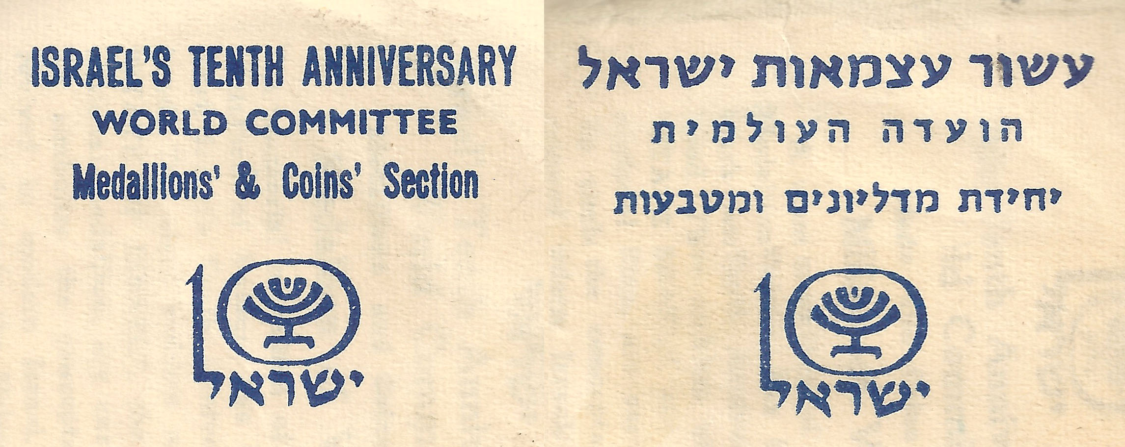 ועדת העשור - היחידה למדליונים ומטבעות